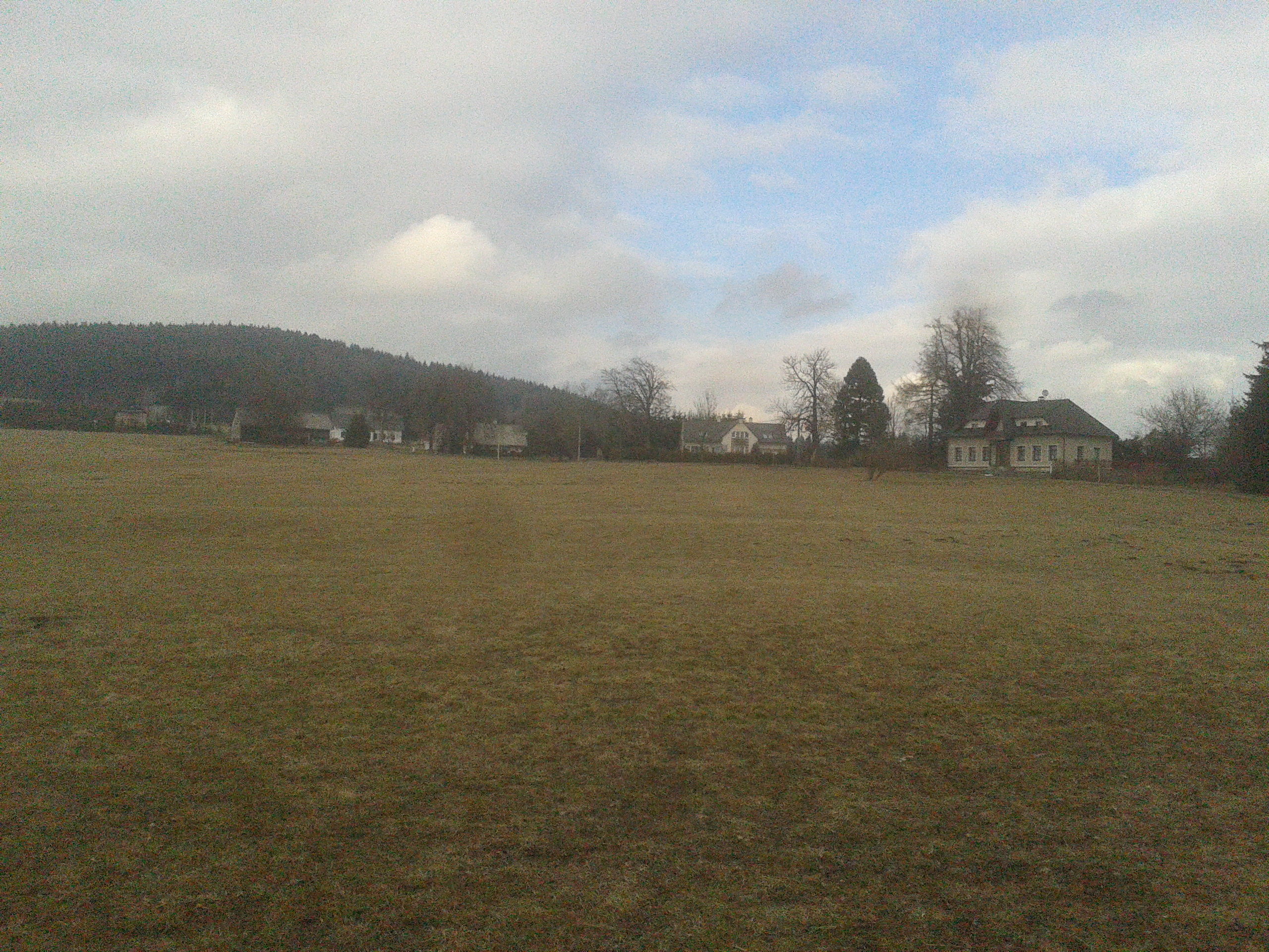 Vesnice Rýdrovice